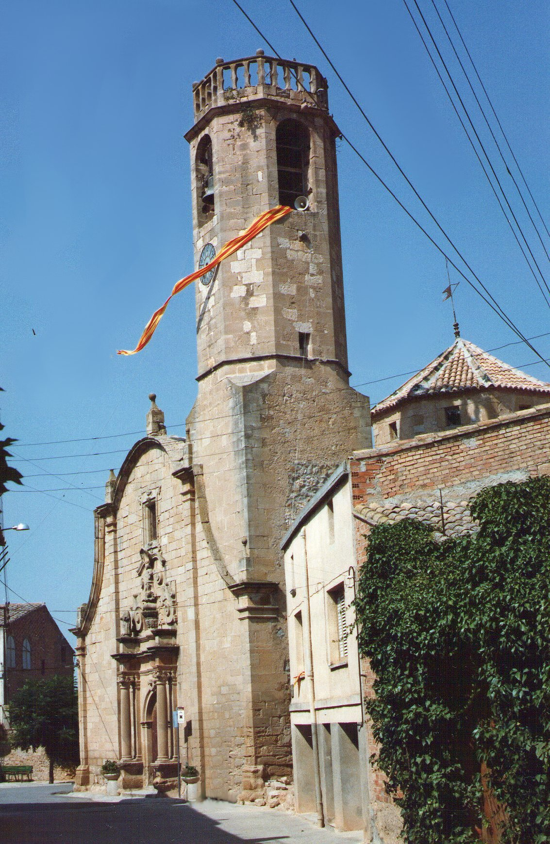 Vista de l'Esglèsia